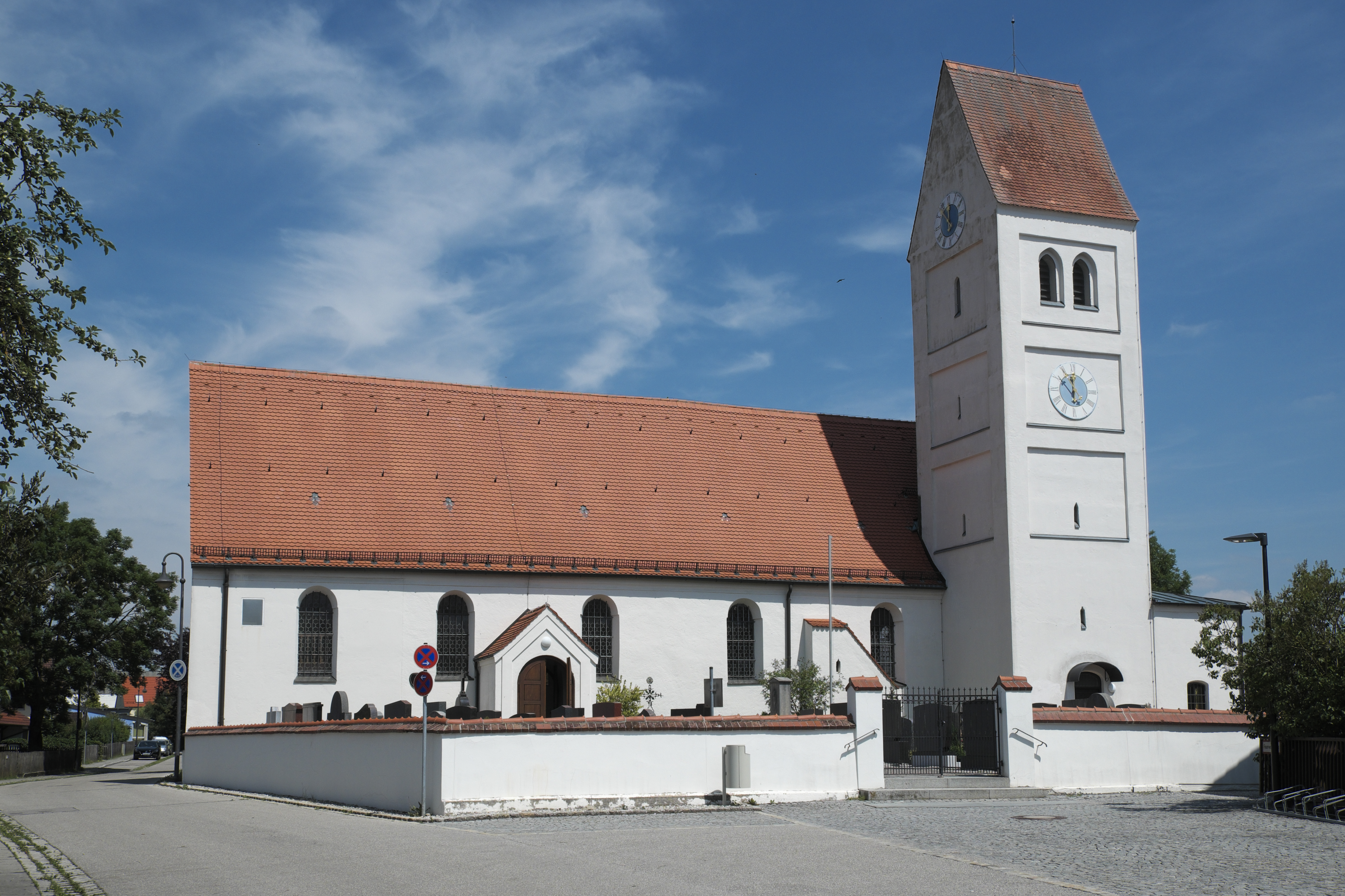 Katholische Pfarrkirche St. Jakob in Unterpfaffenhofen (Germering) im Landkreis Fürstenfeldbruck (Bayern/Deutschland)